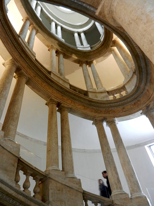 Roma - Scala elicoidale di Ottaviano Mascherino nel Palazzo del Quirinale